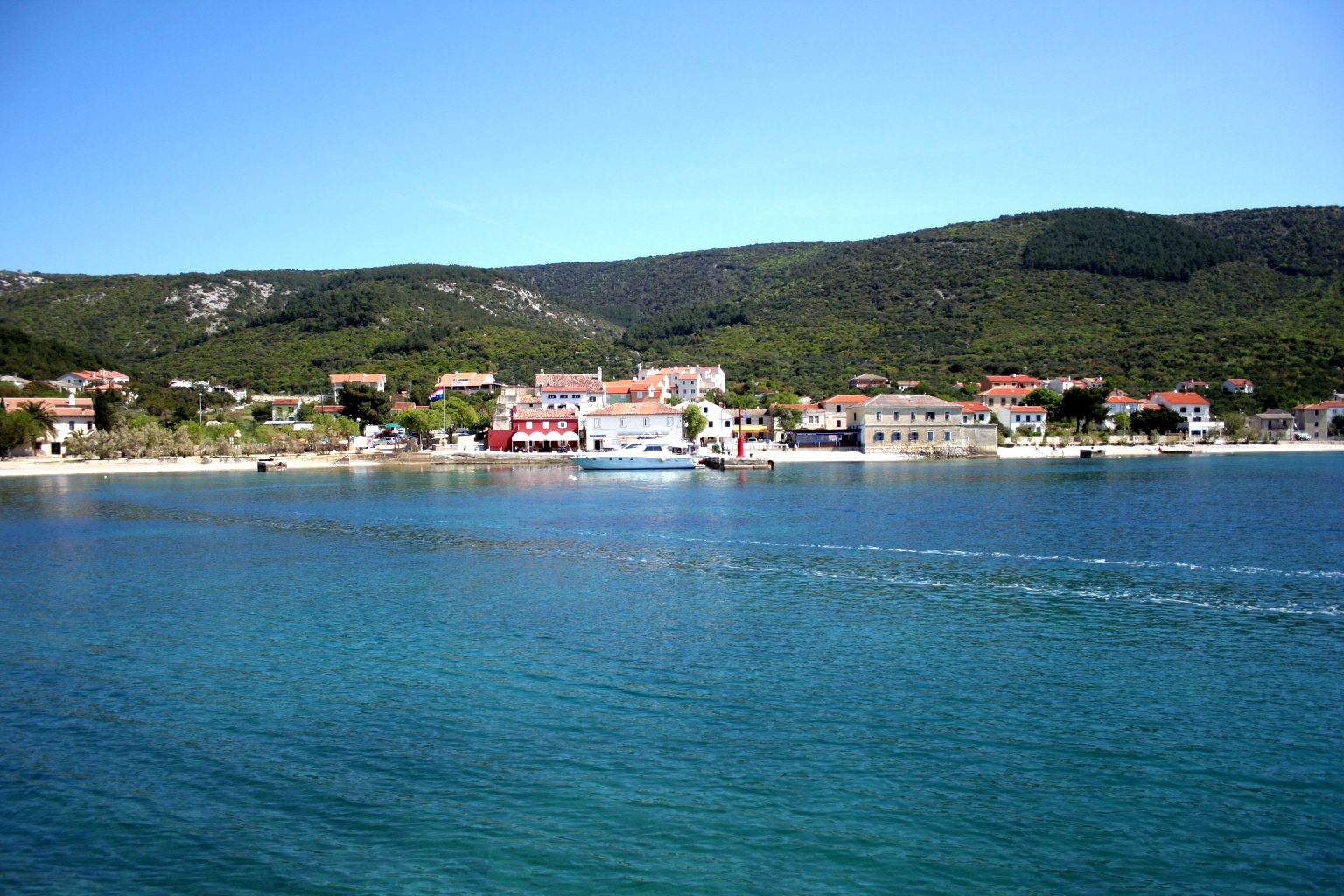 Martinscica sa Branica